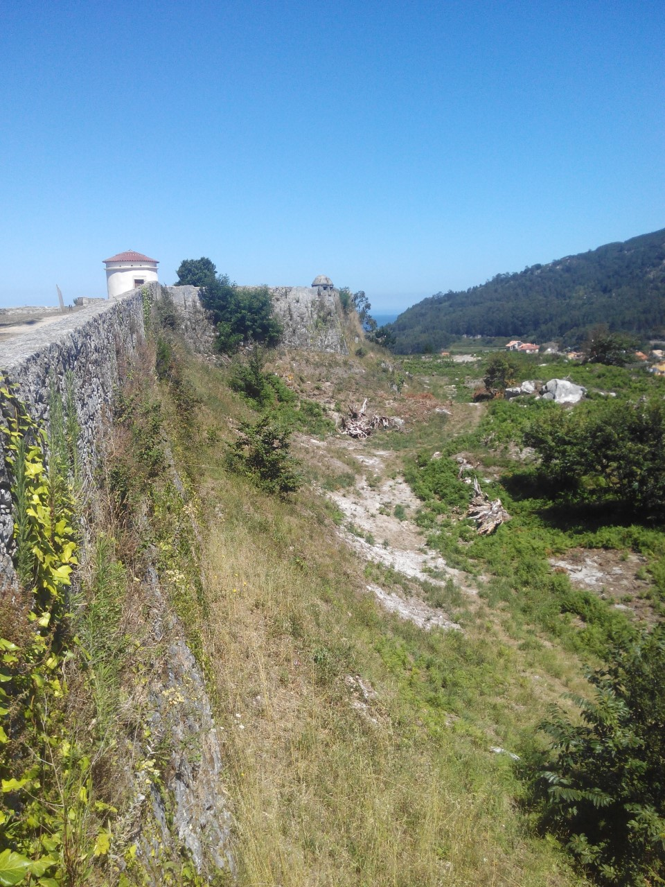 Muro exterior del Castillo de Santa Cruz en La Guardia, España.